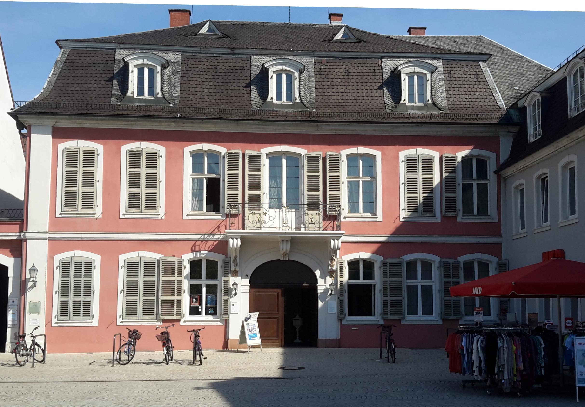 Das so genannte Rabaliatti-Haus am Schwetzinger Schlossplatz